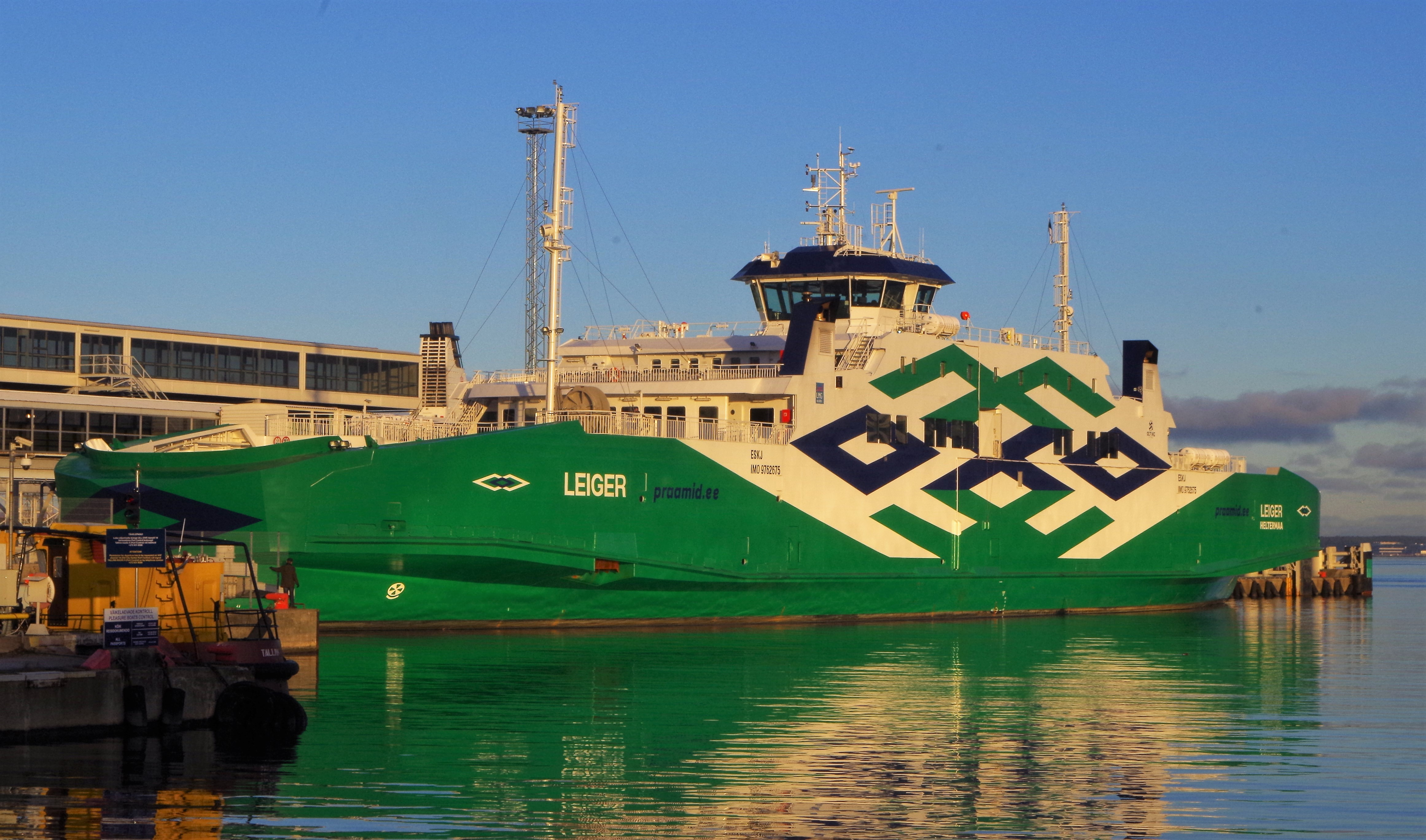 Parvlaev Leiger Tallinna Vanasadamas 11. detsembril 2016